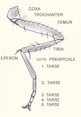 Schéma d'une patte d'insecte (en français)